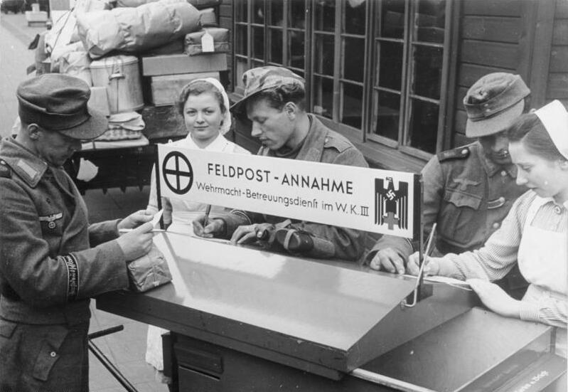 Um den durchreisenden Soldaten die Absendung ihrer Feldpost zu erleichtern, hat der Wehrmachtsbetreuungsdienst eines Wehrkreises [W.K. III] auf den Bahnsteigen eines Bahnhofes [in Cottbus] eine fahrbare Feldpostannahme in Dienst gestellt. Auf einem doppelseitigen Schreibpult können die Soldaten Grüsse an ihre Angehörigen richten. Feldpostkarten, Briefbogen und Umschläge sind bei den DRK-Helferinnen erhältlich. 18. Mai 1944 [Herausgabdatum], Scherl-Bilderdienst (Schwahn)